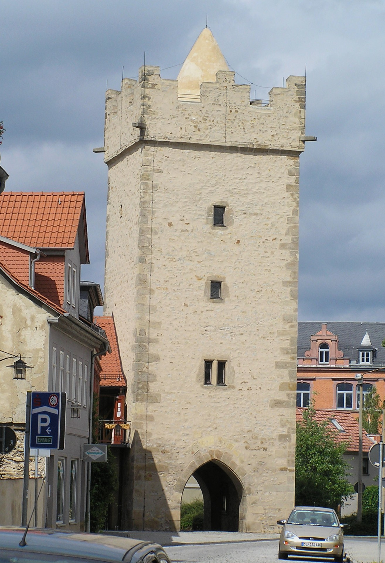 Saalfeld (Thüringen), stadtbefestigung, Darrtor.